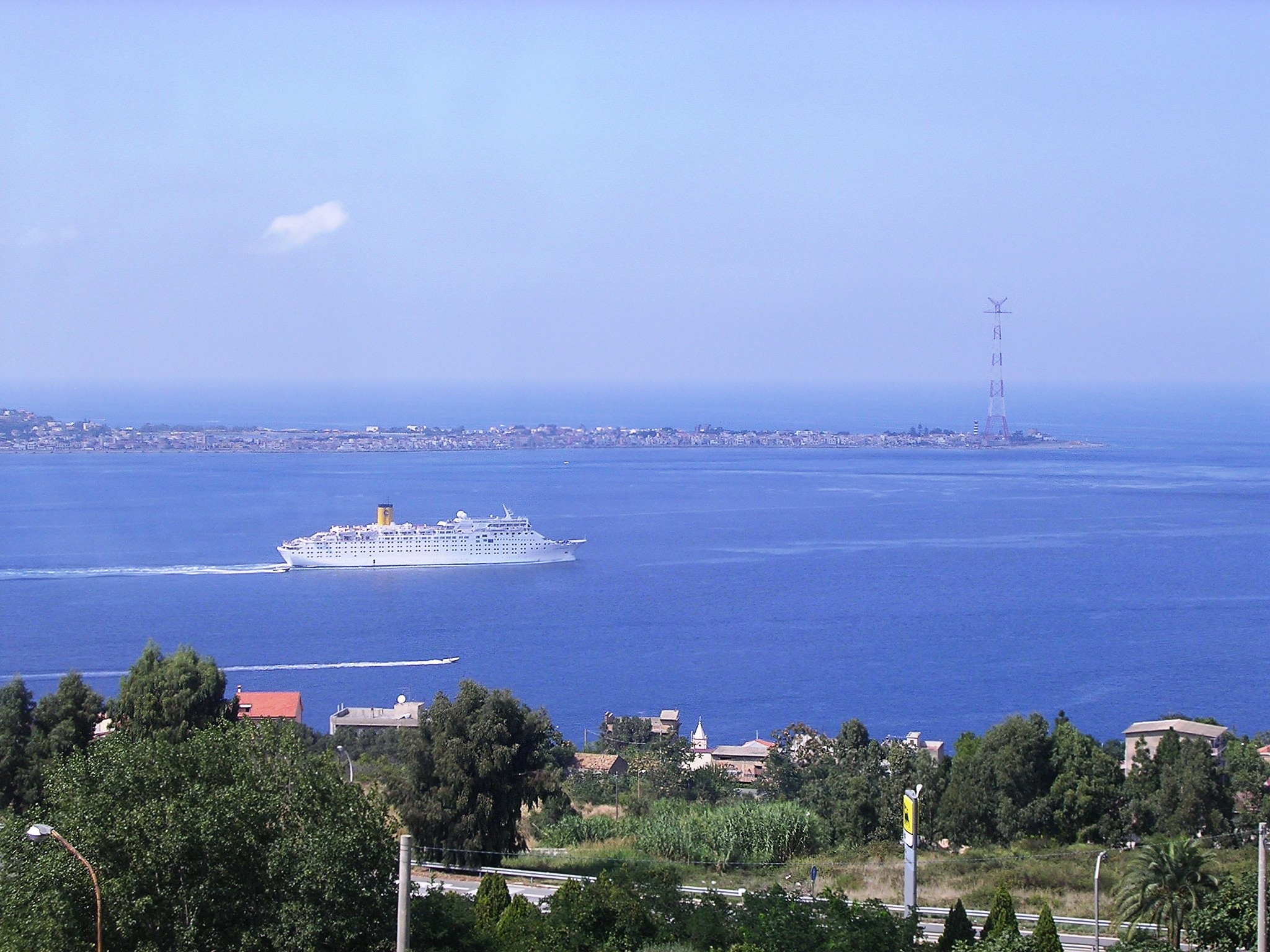 Lo Stretto di Messina visto dalle alture di Piale